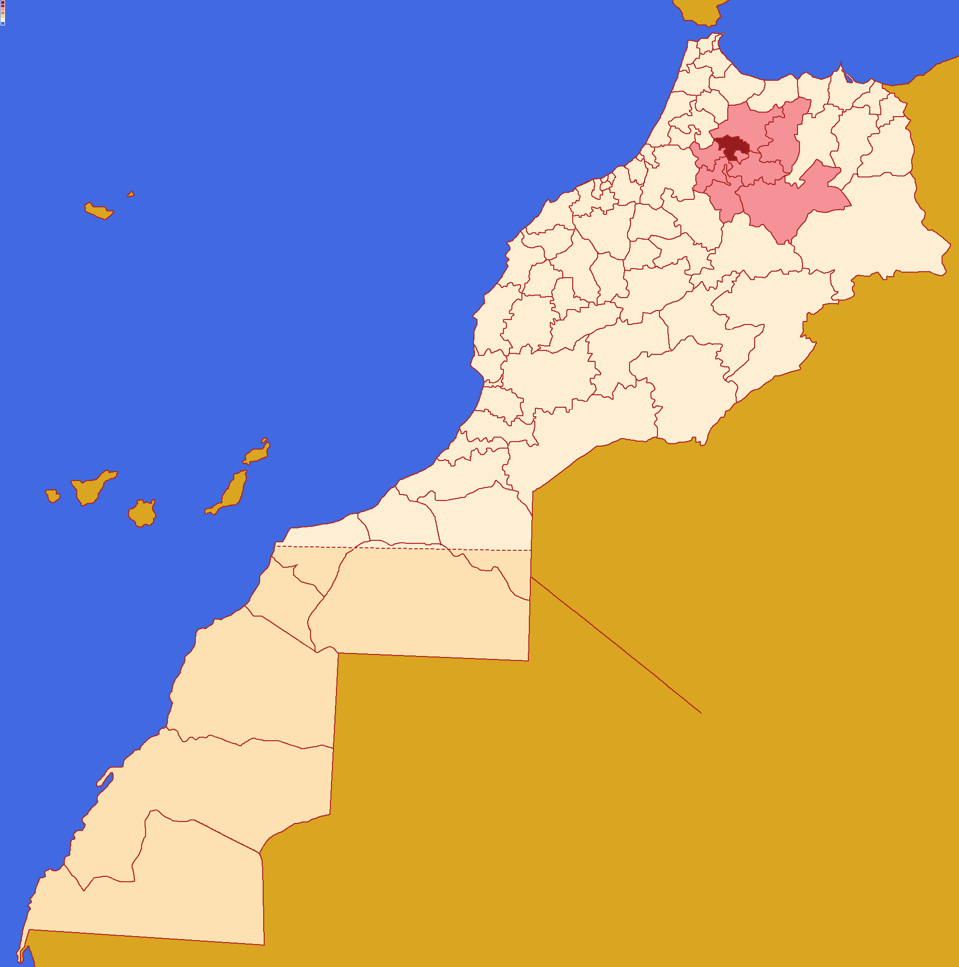 Localização da província de Moulay Yaâcoub ,dentro da região de Fez-Meknès e dentro de Marrocos.Conforme a reforma administrativa de 2015.